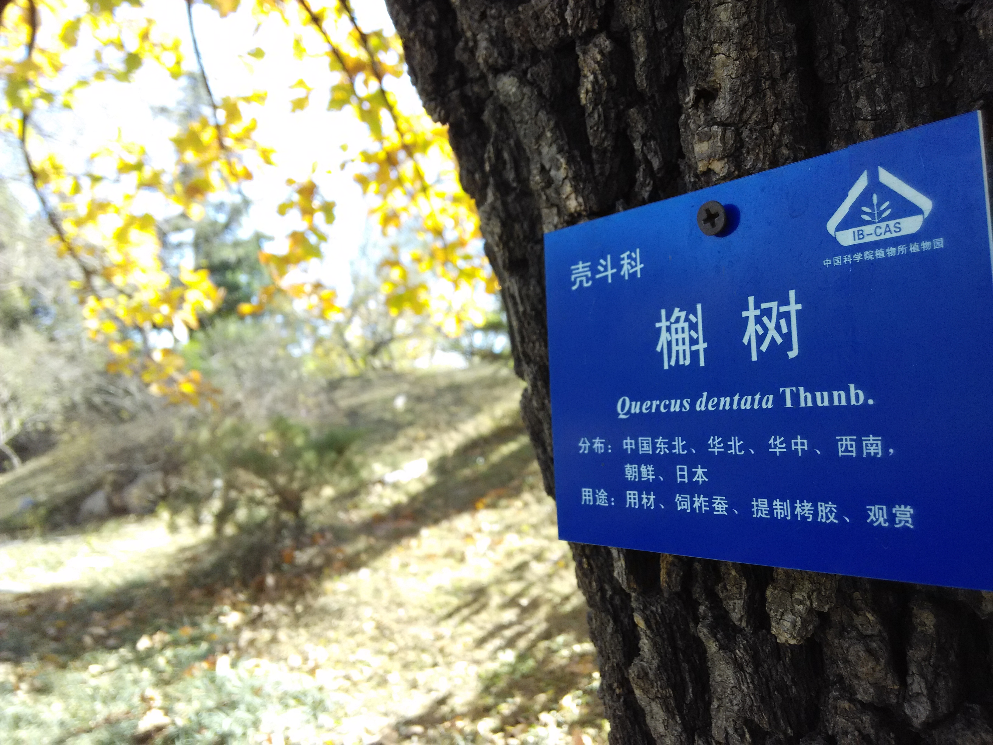 此图展示的是中科院植物园里为游客识别植物而设立的植物标识牌。